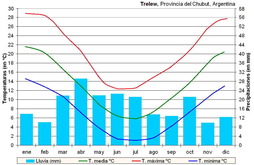 Diagrama elaborado a partir de datos estadísticos climatológicos (período 1981-1990) del Servicio Meteorológico Nacional. [1] Usado como referencia también, el archivo Clima Comodoro Rivadavia (Argentina).PNG